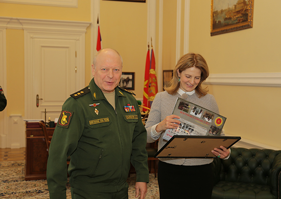 Главнокомандующий Сухопутными войсками генерал-полковник Олег Салюков и президент группы компаний «Инфо Вотч» Наталья Касперская после выступления с лекцией «Развитие информационных технологий» перед генералами и офицерами Главного командования Сухопутных войск